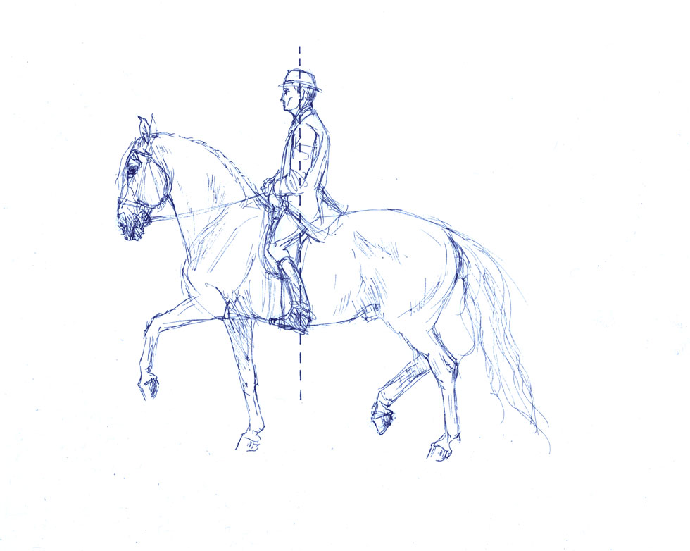 Gemeinsamer Schwerpunkt von Reiter und Pferd